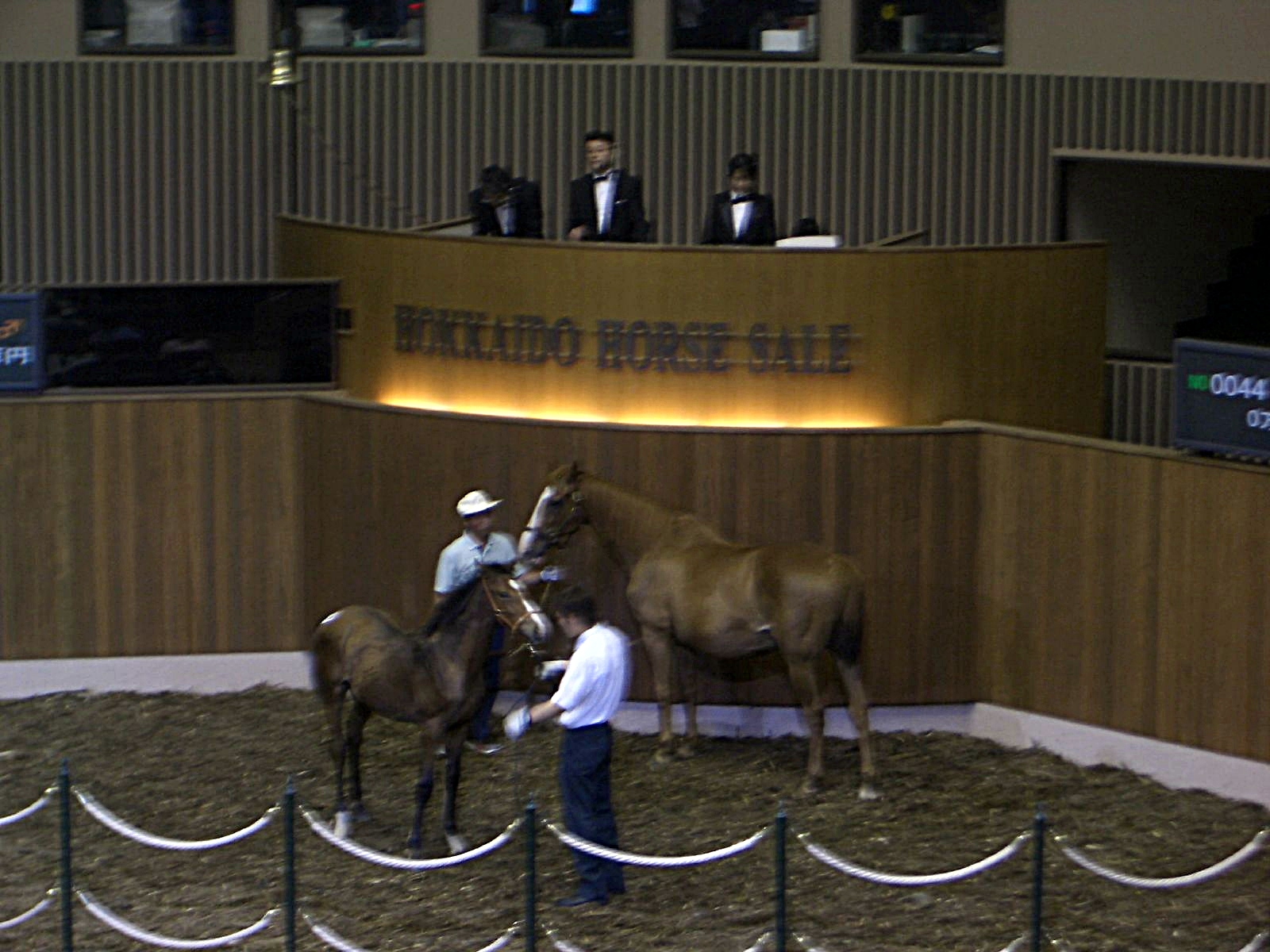 セレクトセール